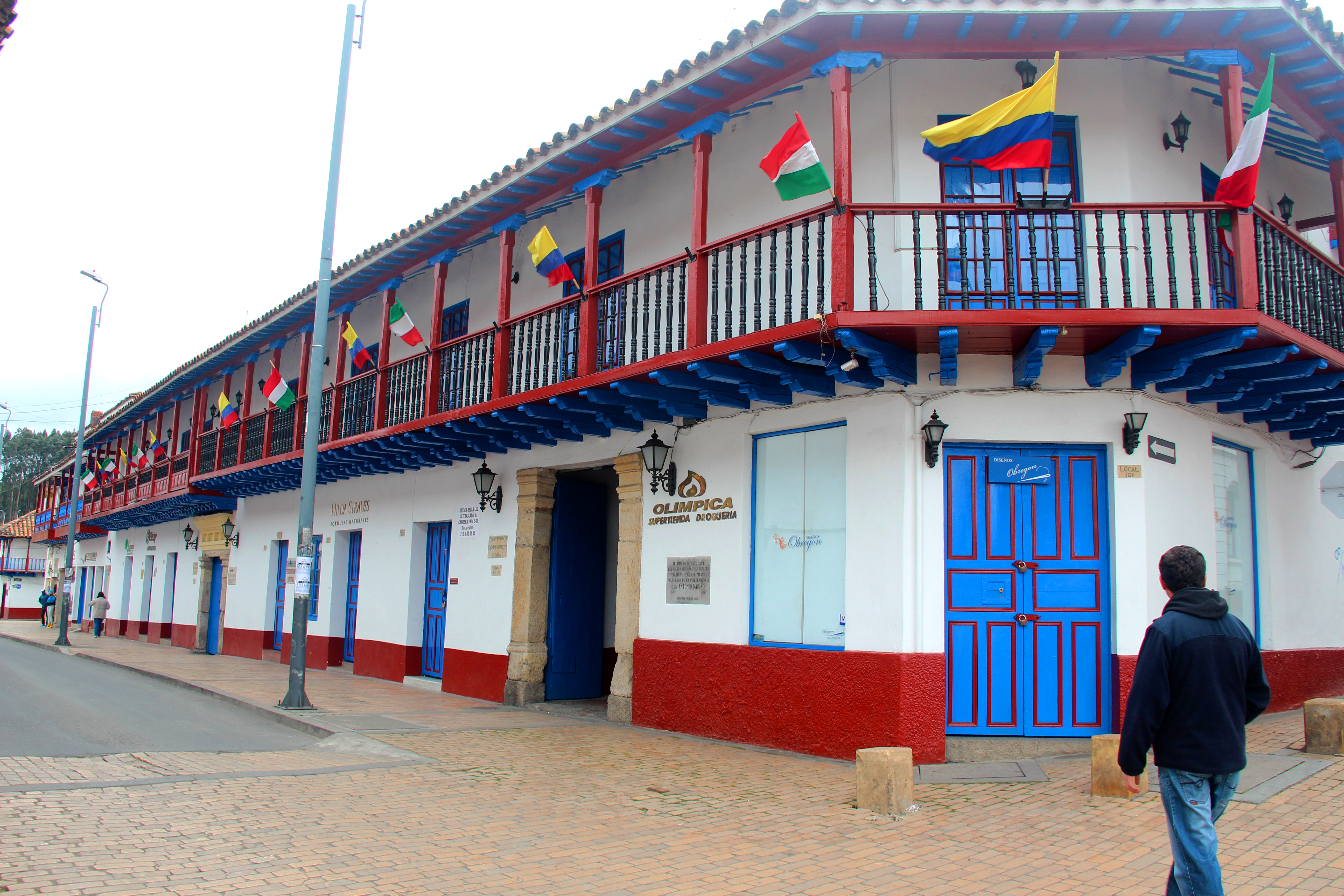 Inmueble del centro urbano de Zipaquirá, Cundinamarca, Colombia. En esta vivienda reposarón entre los años 1849 y 1850 las cenizas de Antonio Nariño. El centro urbano fue declarado bien de interés cultural a través de la Resolución 87 del 2 de febrero de 2005.